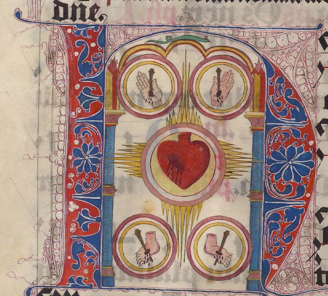 Mn Kn 28-1181 folio 116 - Image-Enluminure du Sacré-Coeur -dans un antiphonaire